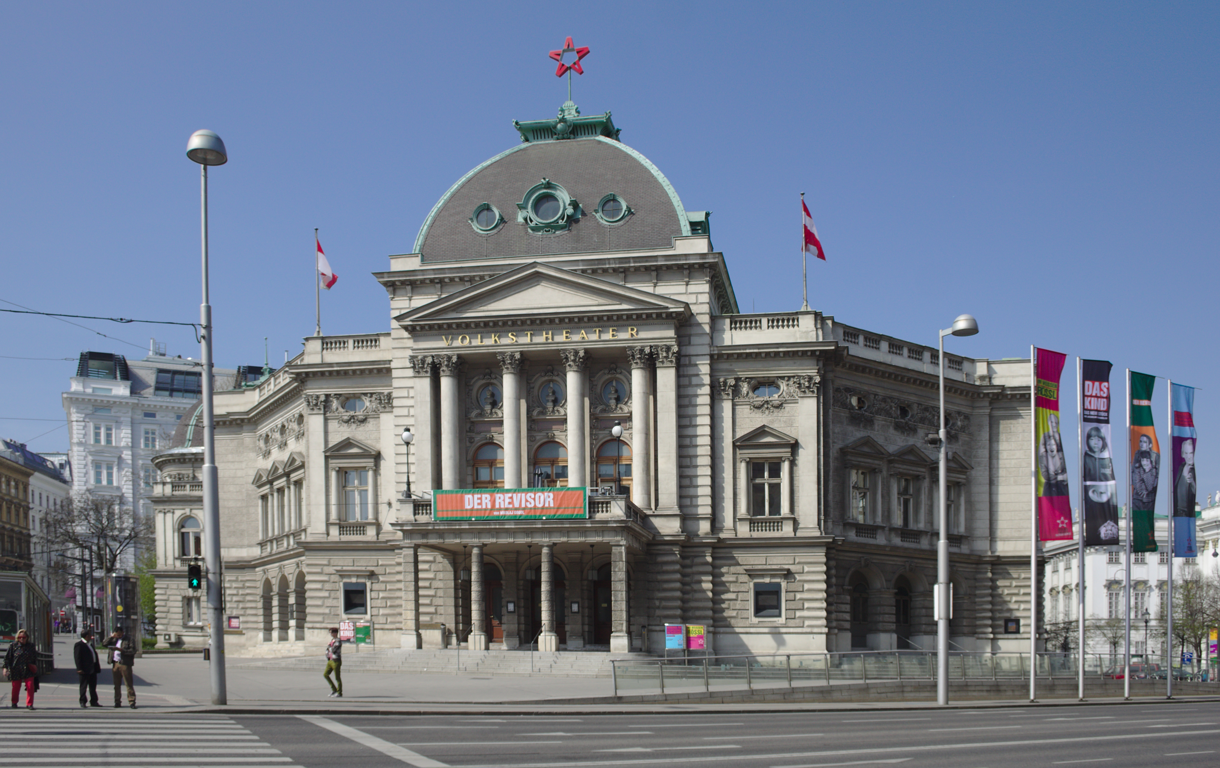 Volkstheater